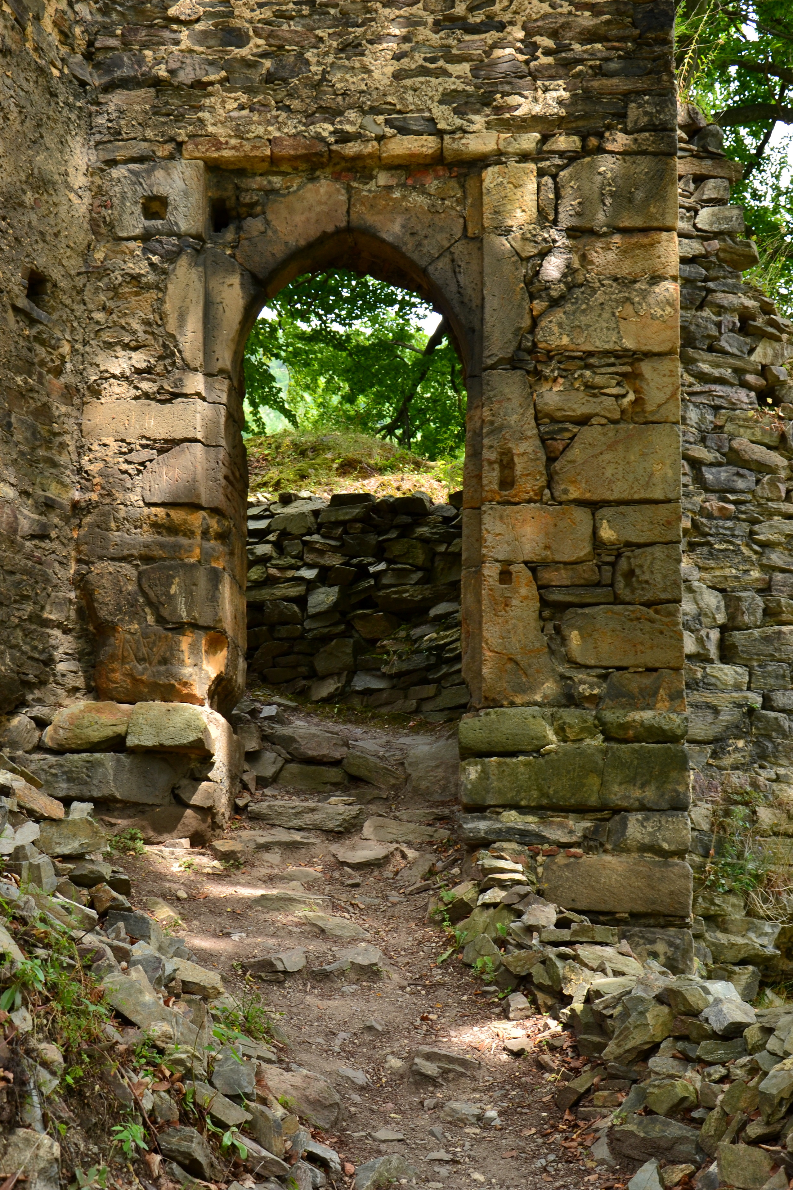 Zřícenina hradu Rýzmburk - branka do hradního jádra, Osek (okres Teplice).